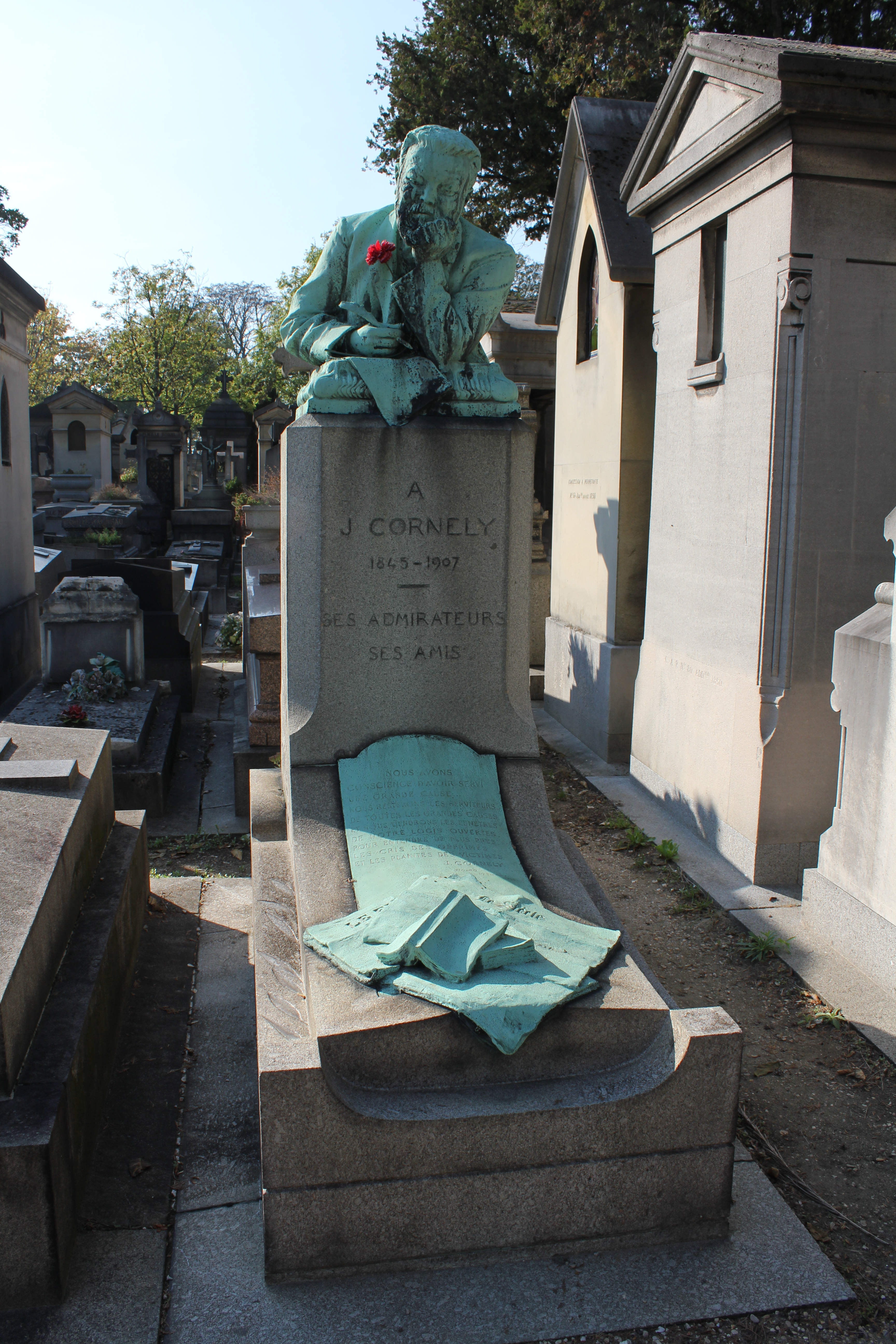 Sépulture de Jean Joseph Cornély- (1845-1907), journaliste, qui fut successivement rédacteur en chef des quotidiens Le Gaulois, Le Clairon et Le Figaro. Membre fondateur du Syndicat des journalistes français, il a aussi participé en 1899 à la création de la première école de journalisme, l'École supérieure de journalisme de Paris.vue générale, face avant